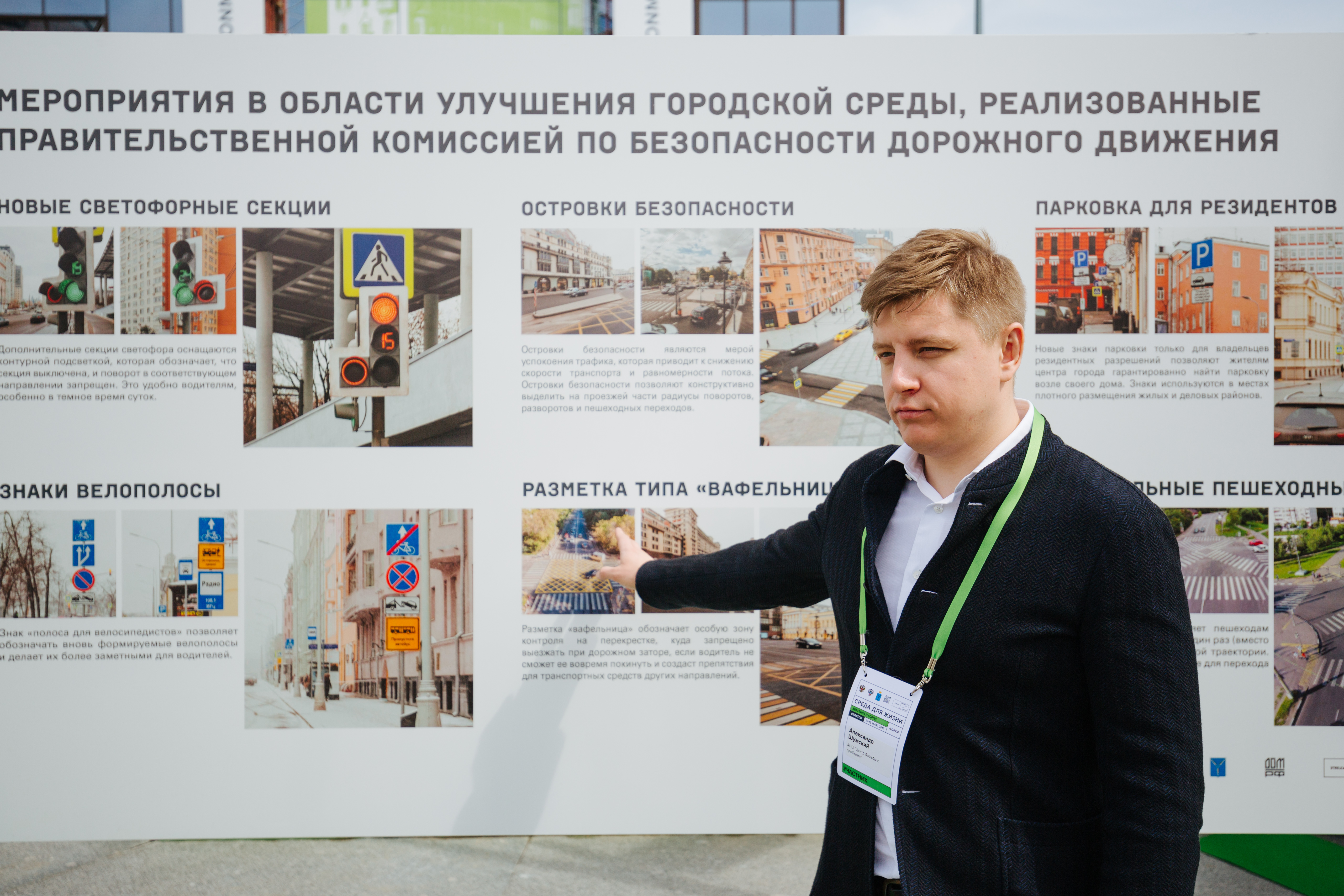 Основатель Александр Николаевич Шумский проводит презентация нововведений